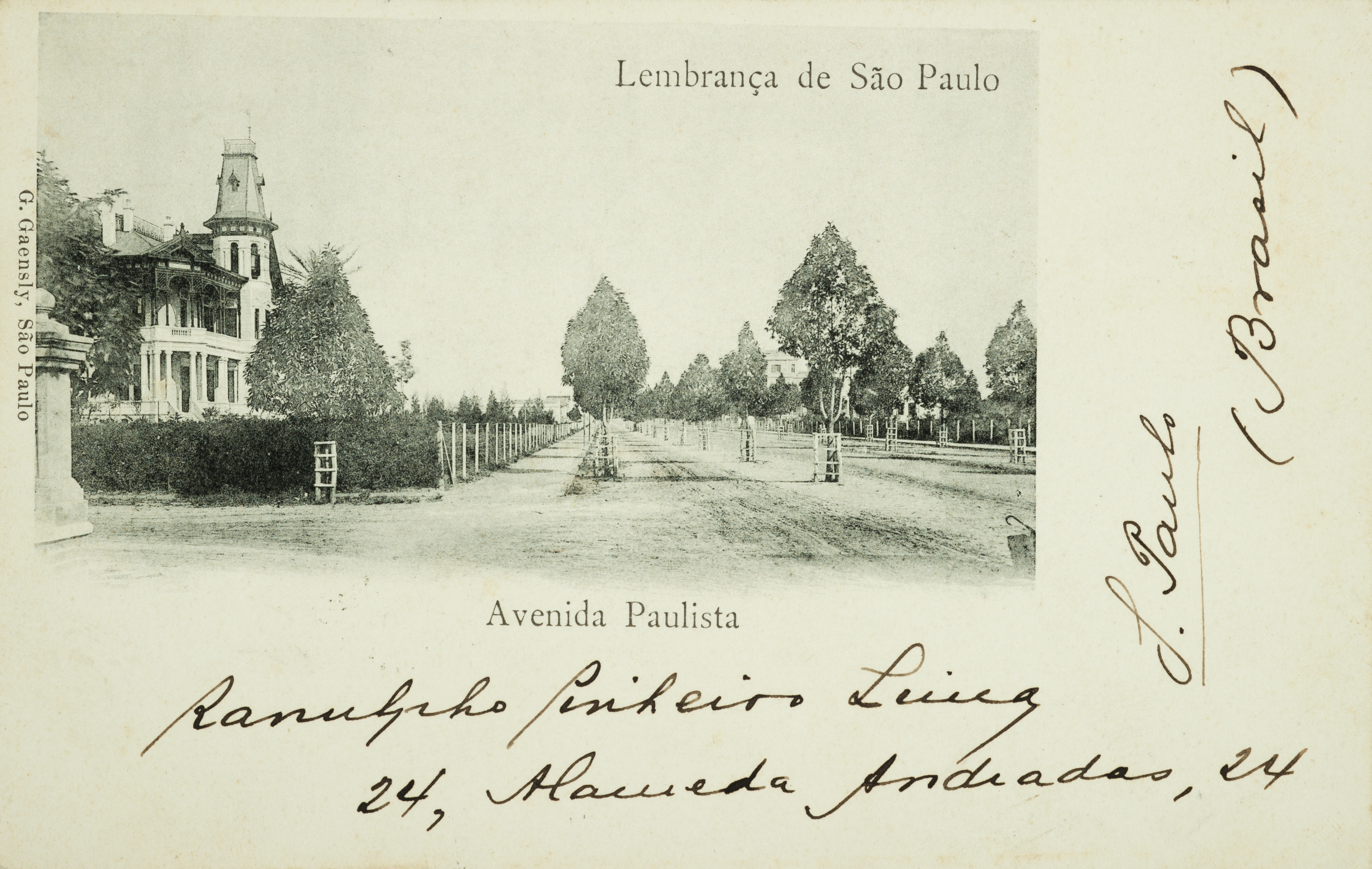 Obra que integra o acervo do Museu Paulista da USP.